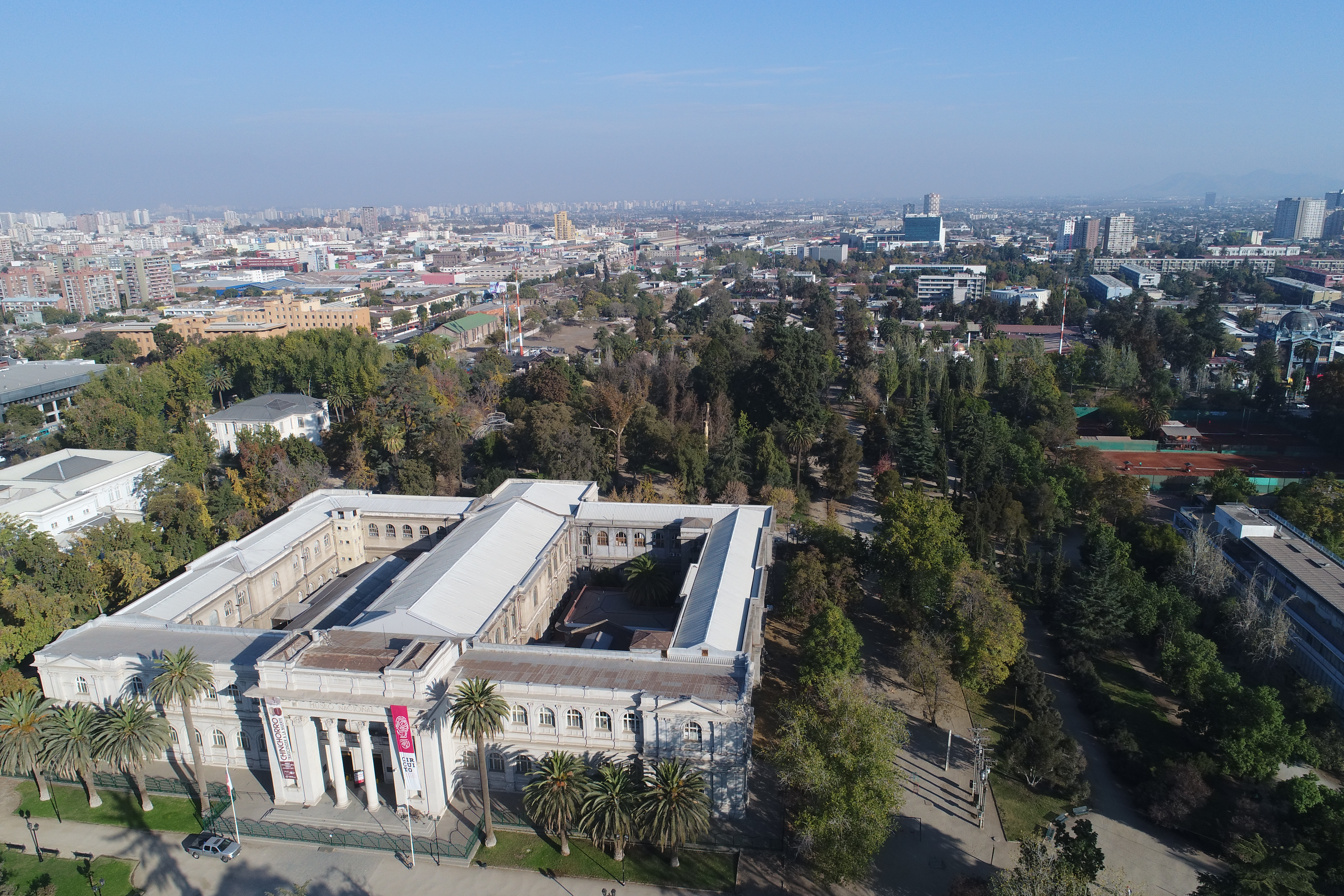 Vista aérea del Museo Nacional de Historia Natural y del sector sur del Parque Quinta Normal, en Santiago.